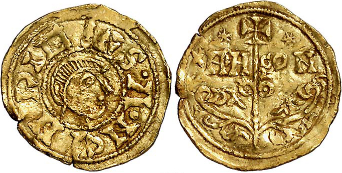 Mancuso aragonés de oro de Sancho Ramírez. Aparece en la documentación coetánea como «.mancusos iacensis» o «auro de Iacca». Oro de 18 quilates con aleación de plata. Acuñado h. 1089 en Jaca. 1,95 gr. ANVERSO: efigie de Sancho Ramírez. Leyenda: SANC(ius).IN D(ei).(nomi)NE (Sancho en el nombre de Dios) o SANCI(I) N(OST)RI M(AN)C(USUS) según distintas fuentes. REVERSO: Cruz procesional sobre vástago con florituras vegetales a los lados. Leyenda: ARA-GON